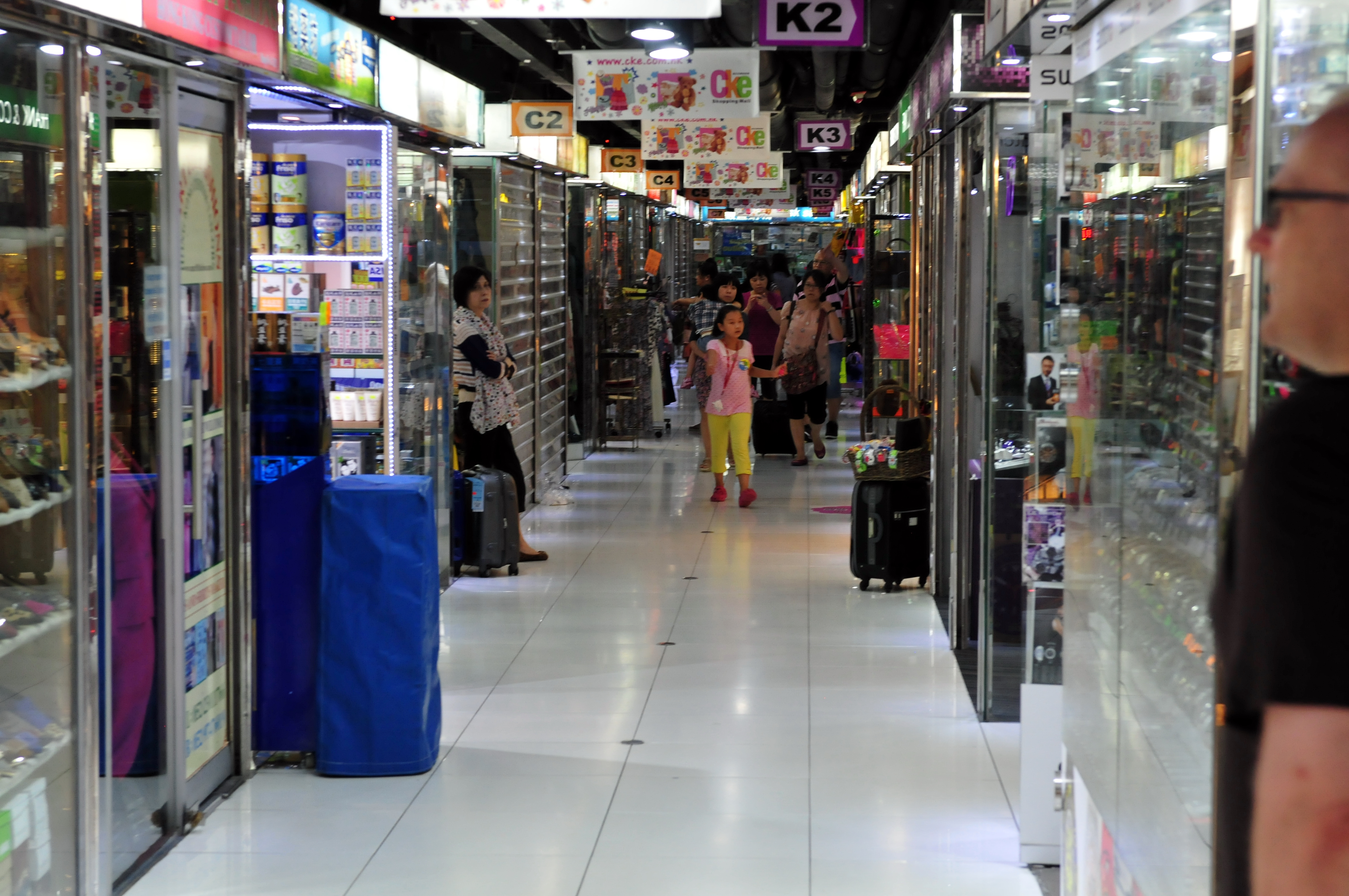 Wikimania 2013 Hongkong